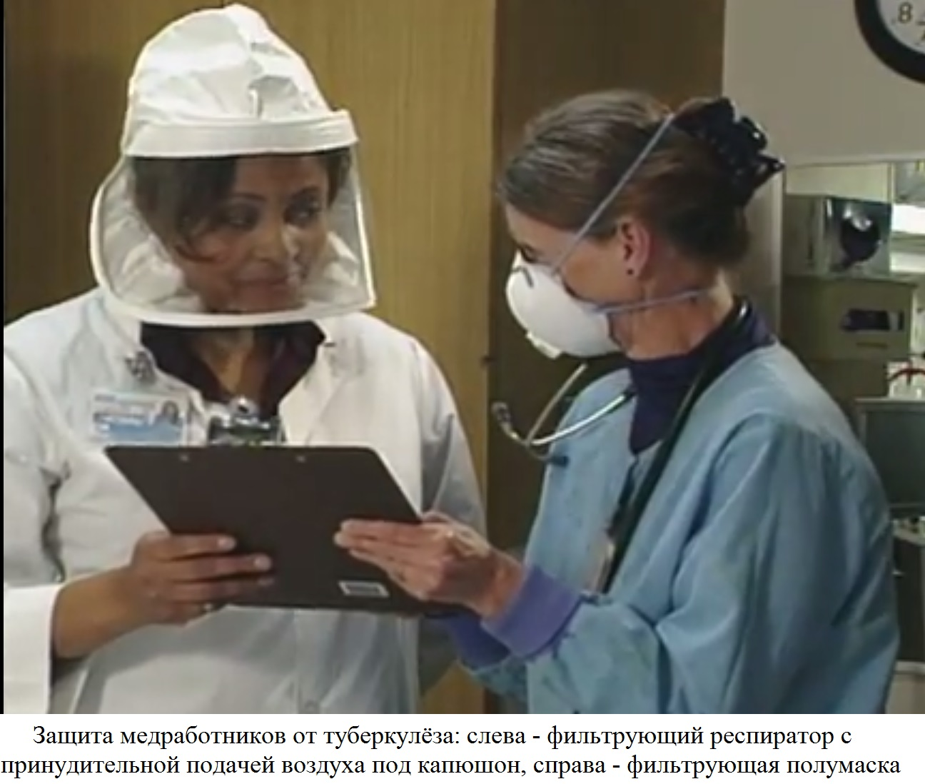 Защита медработников от туберкулёза